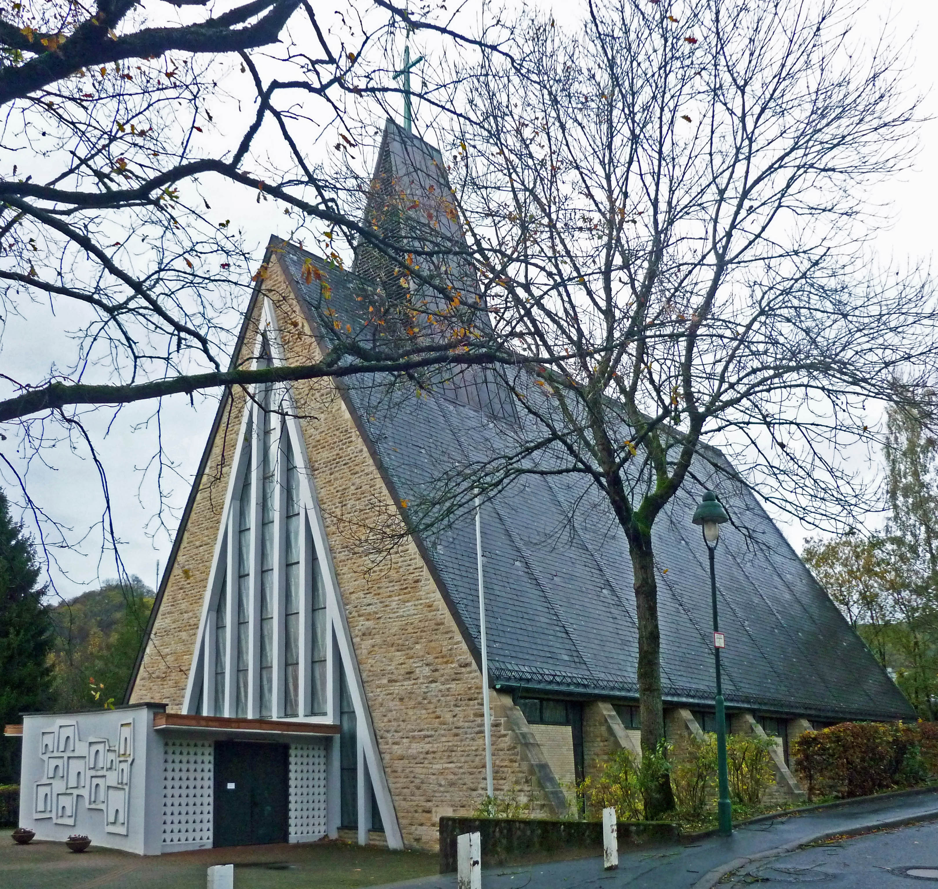 Kath. Pfarrkirche St. Benno in Bad Lauterberg